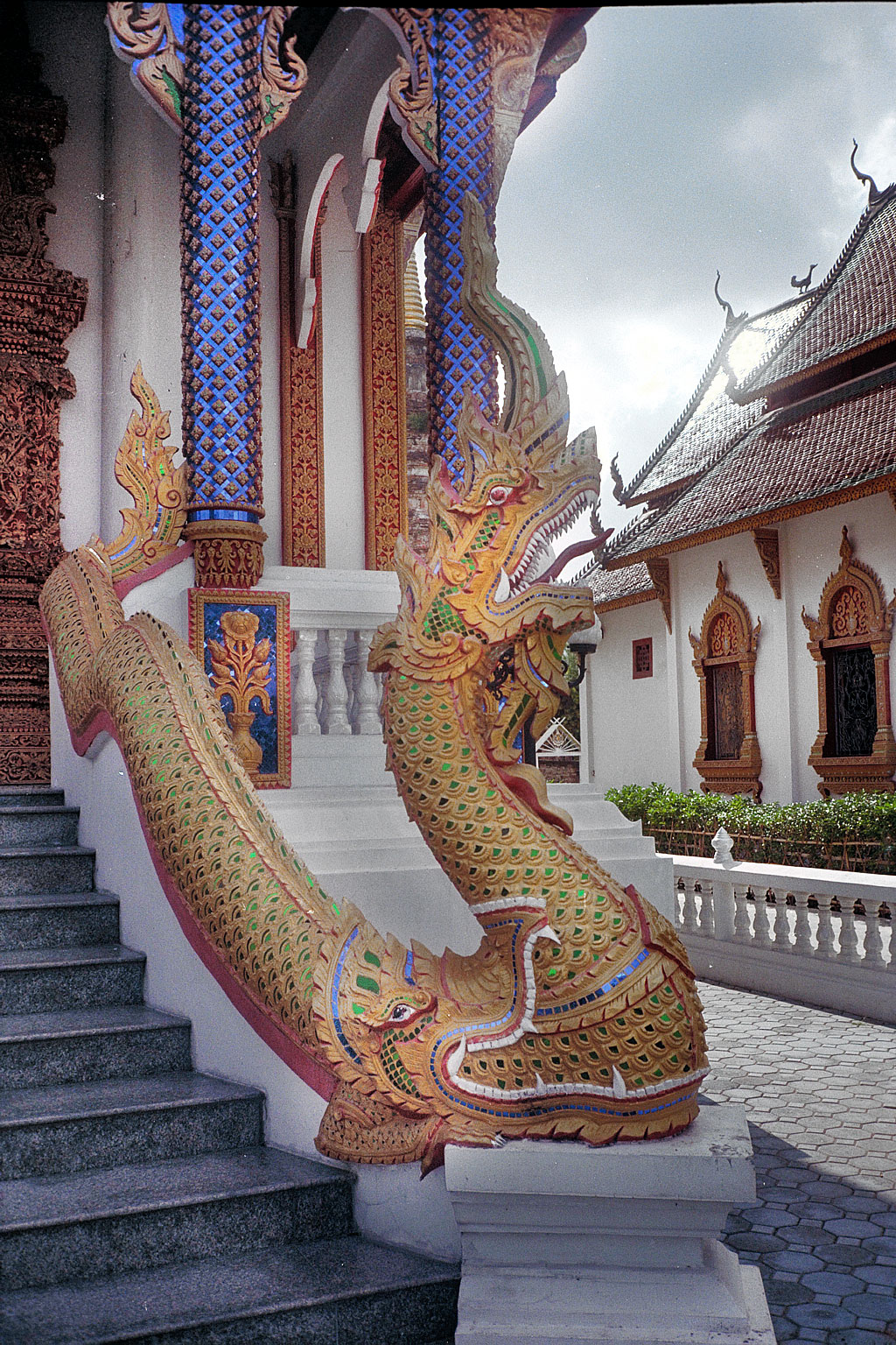 Naga guarding a staircase, Wat Saen Mueang Ma, Chiang Mai, Thailand.